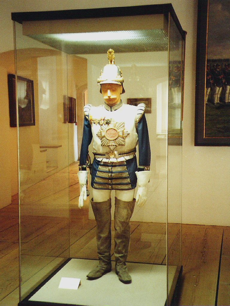 Armeemuseum Ingolstadt - Hartschier